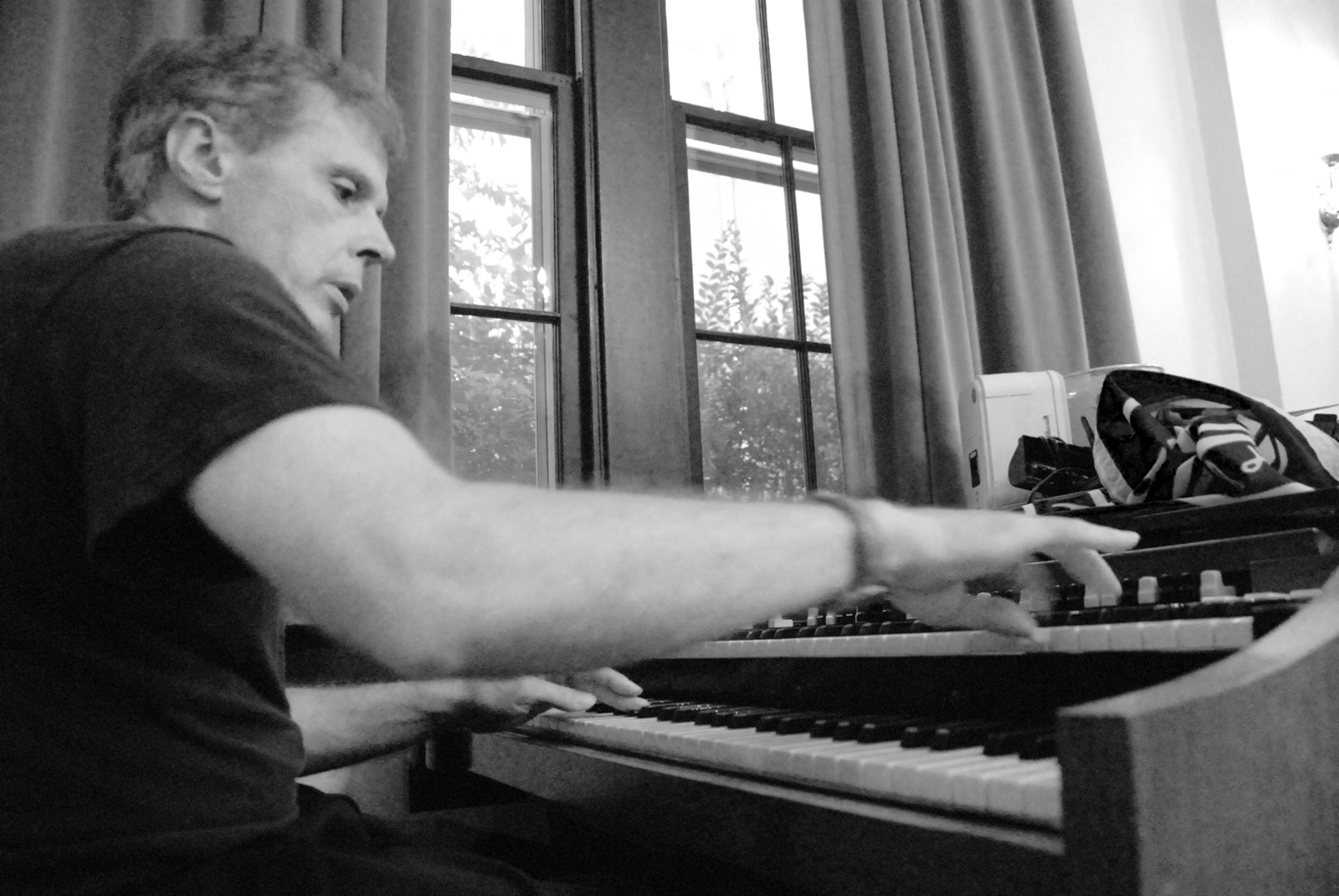 Bill Heid